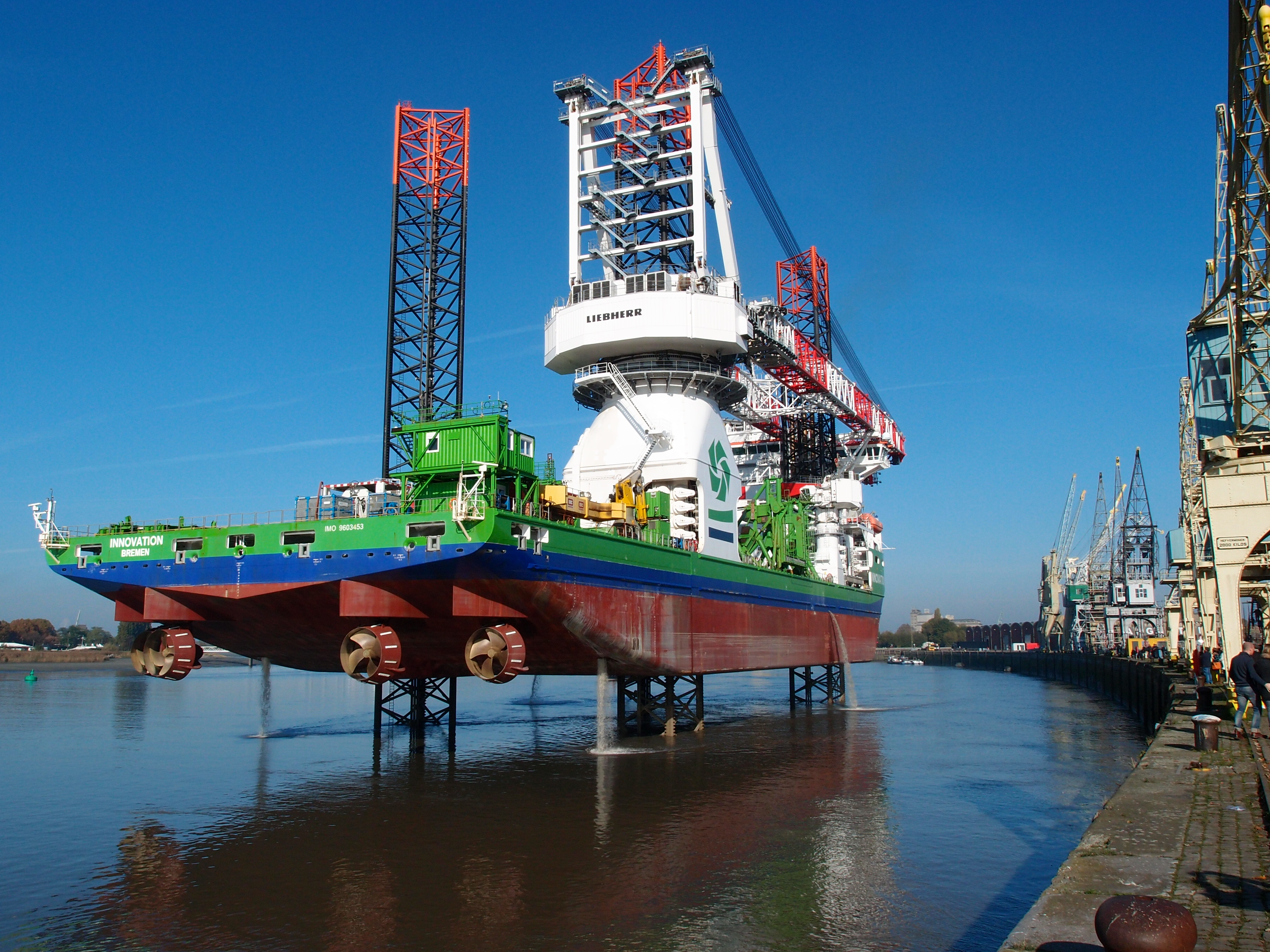 Bohrinsel in der Schelde in Antwerpen